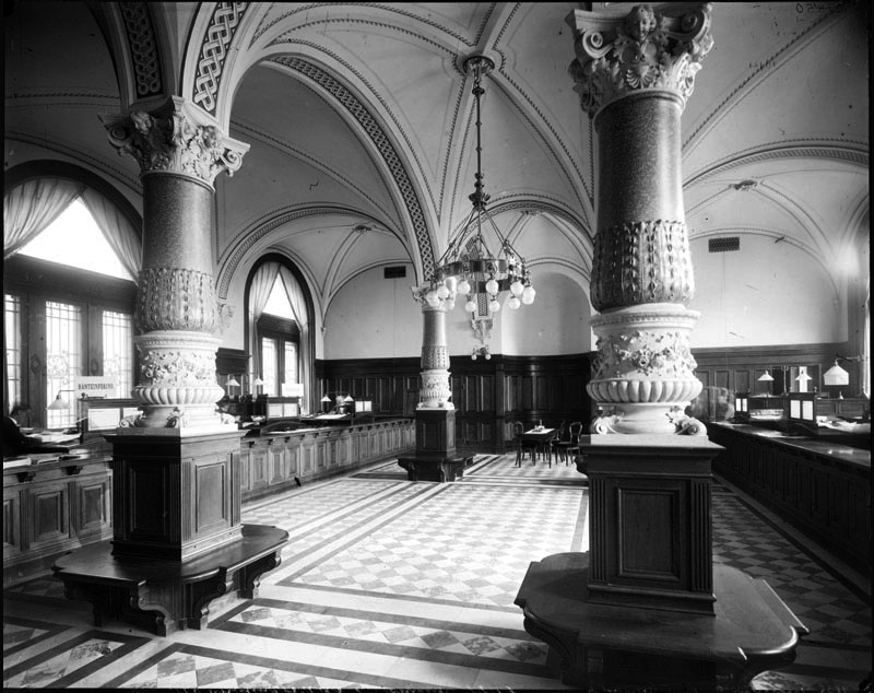 Interiör från Stockholms stads sparbank, Fredsgatan 9